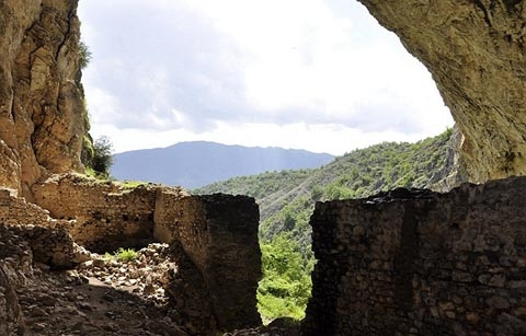 Дел од тврдината во која живеела Пеша сетрата на Крали Марко